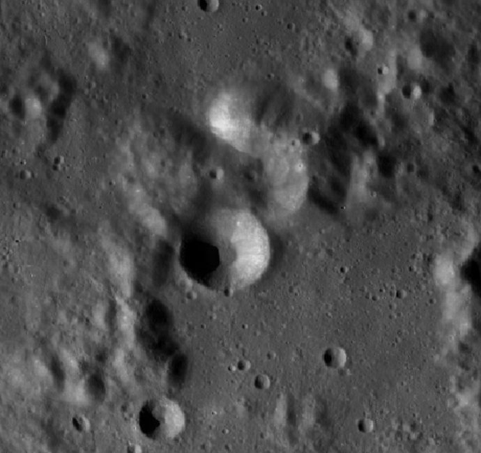 Cráter lunar Fredholm. (Imagen LRO)